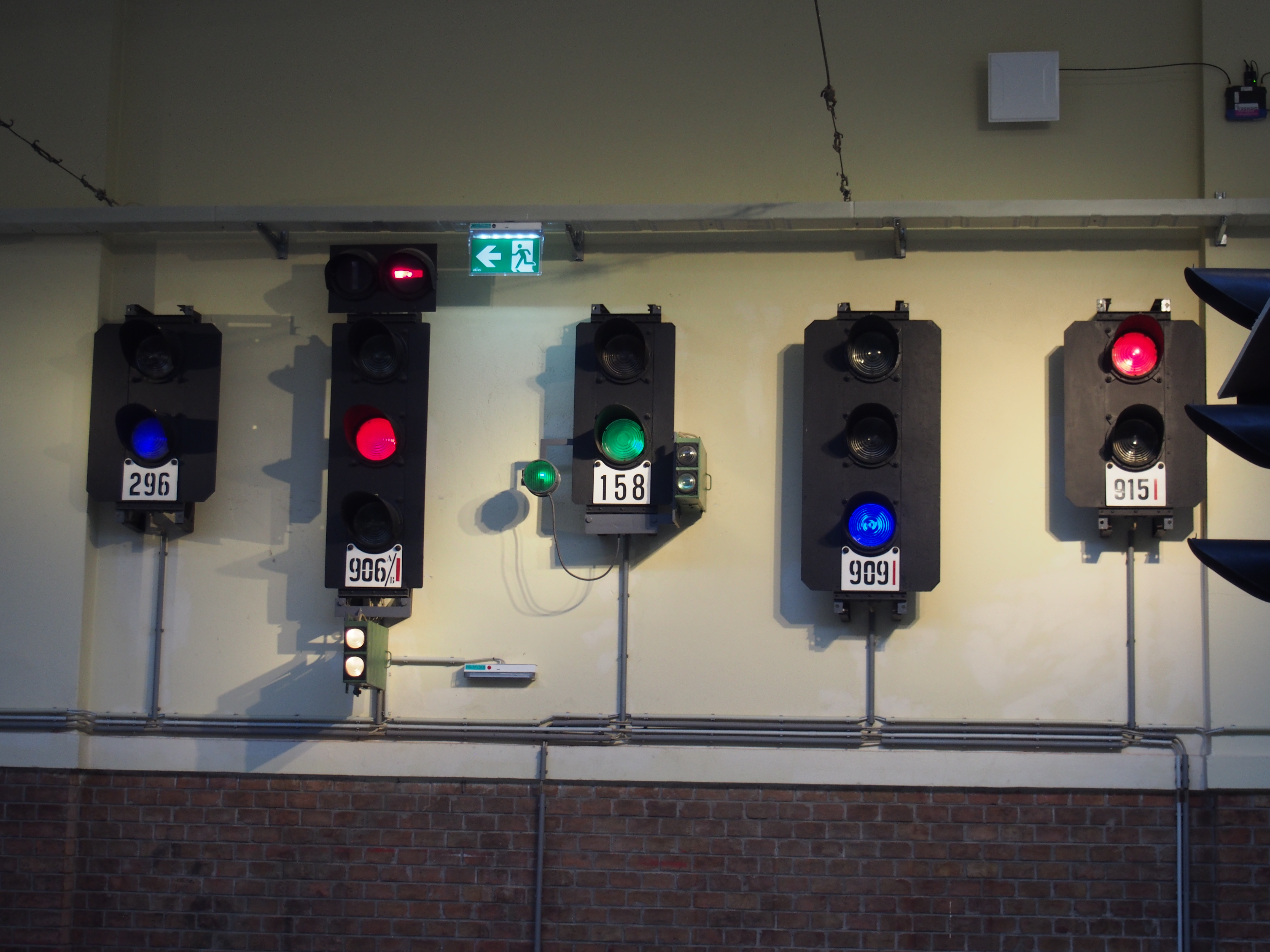 Remise - Transport Museum Vienna (Verkehrsmuseum der Wiener Linien)